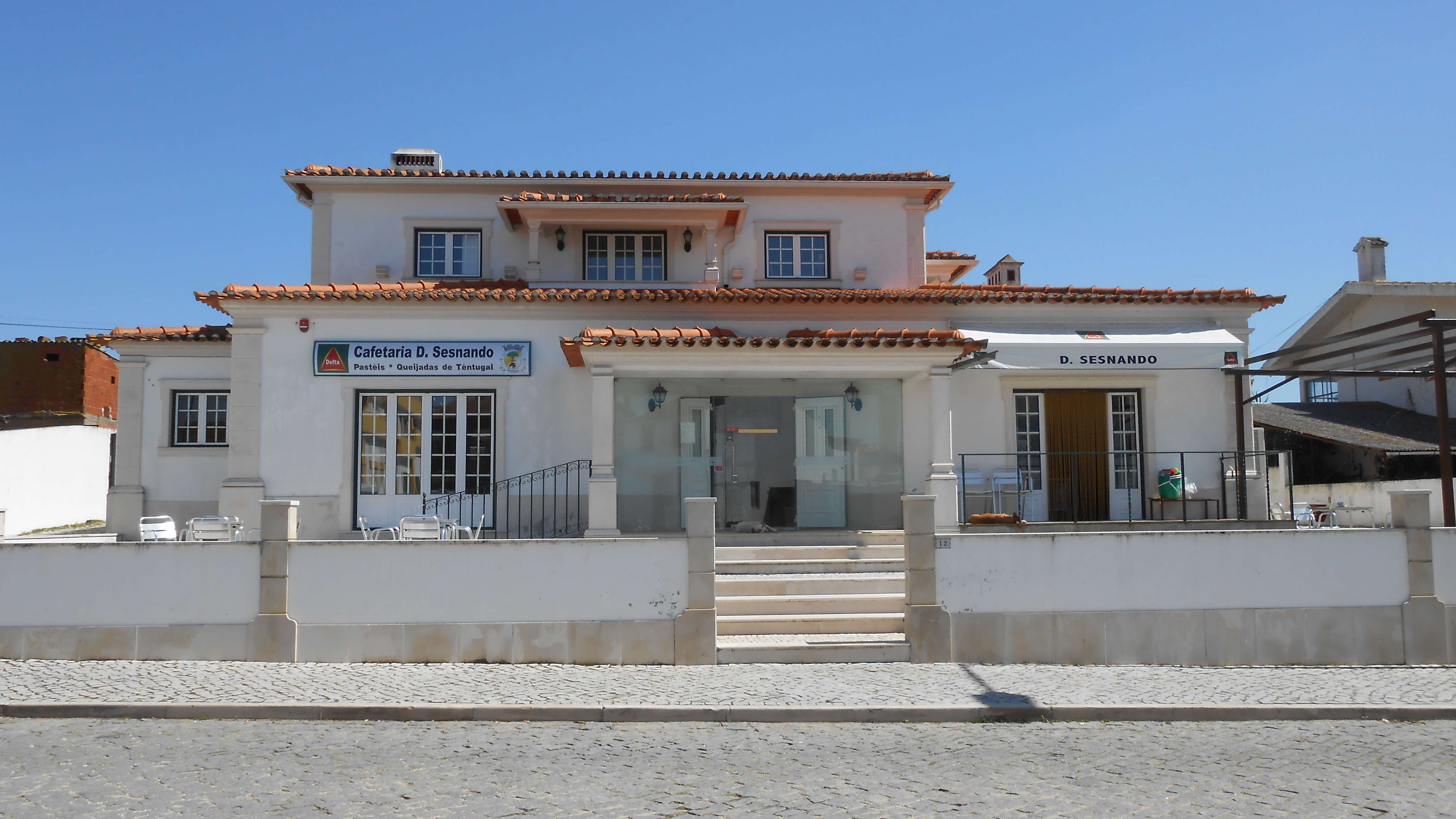 Einer der Hersteller des Pastel de Tentúgal (Blätterteigspezialität, Süßspeise aus Tentúgal)